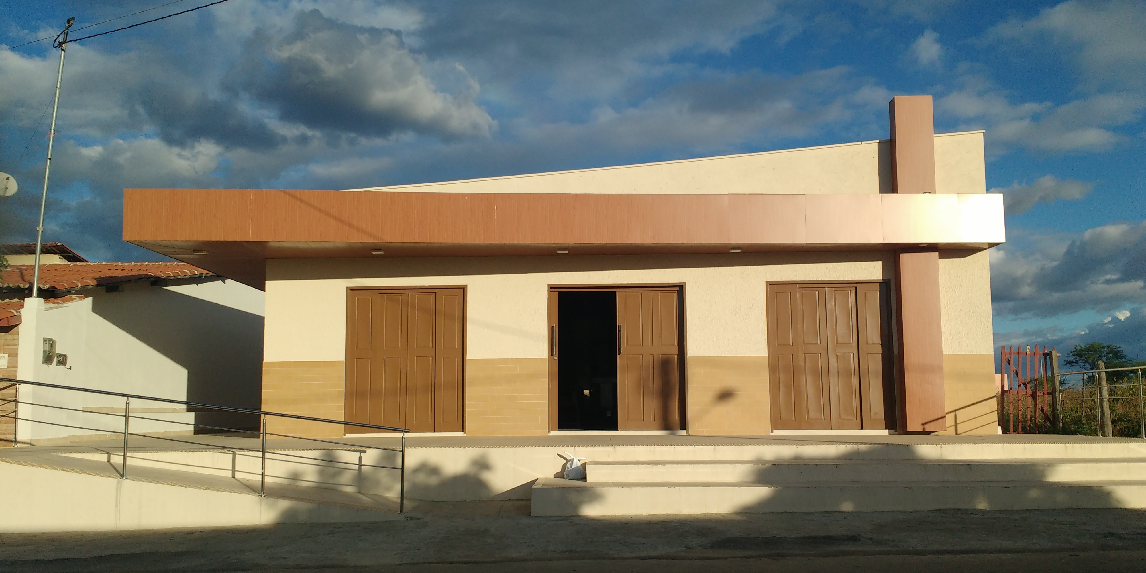 Capela Santo Antônio, da paróquia de Nossa Senhora da Conceição, no bairro Riacho do Meio, em Pau dos Ferros, Rio Grande do Norte (Brasil).